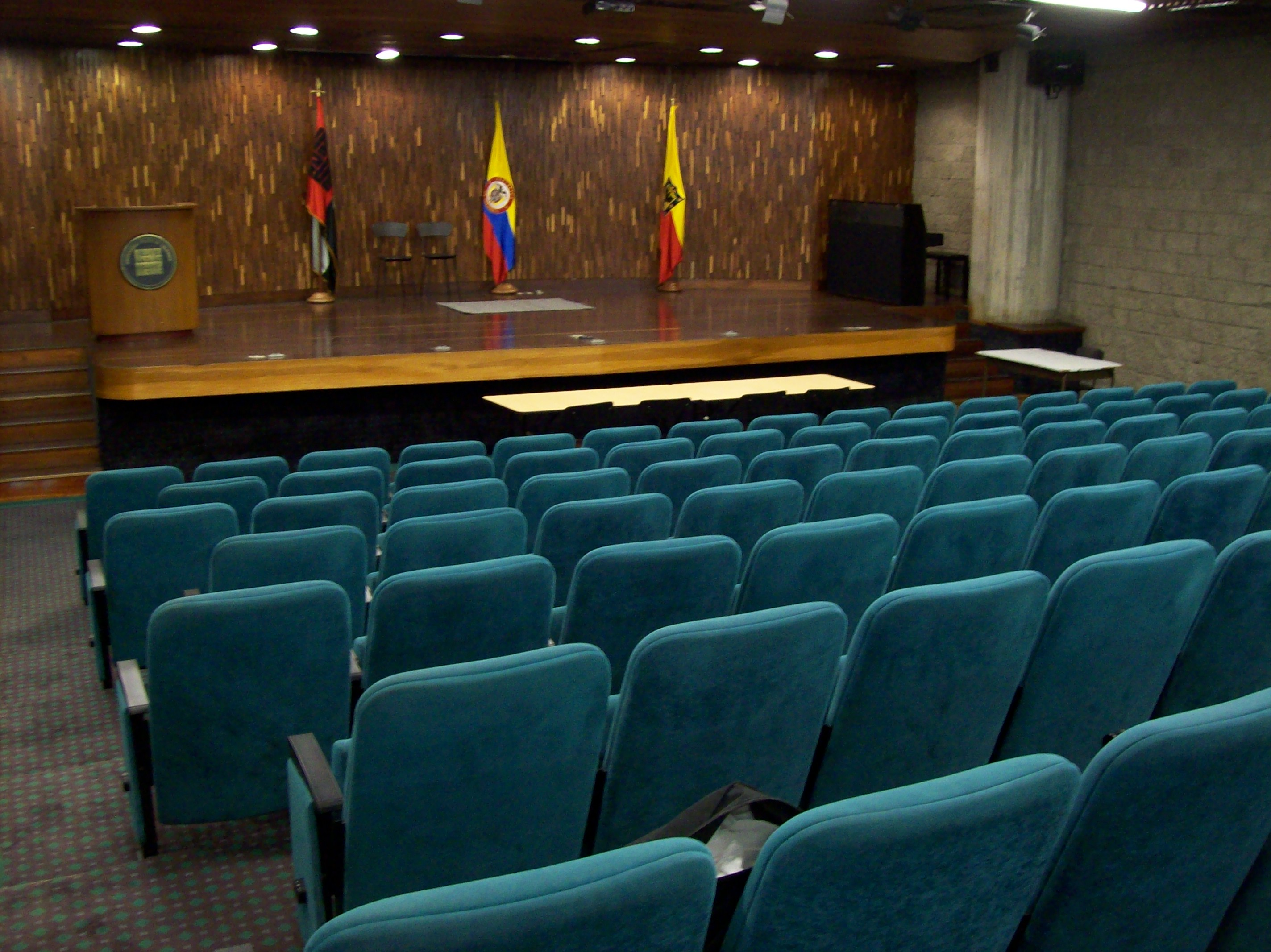 Auditorio Principal Edificio APR